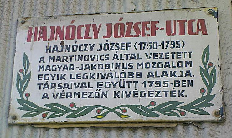 Hajnóczy József emléktábla. Budapest XII. kerülete, Hajnóczy József utca.